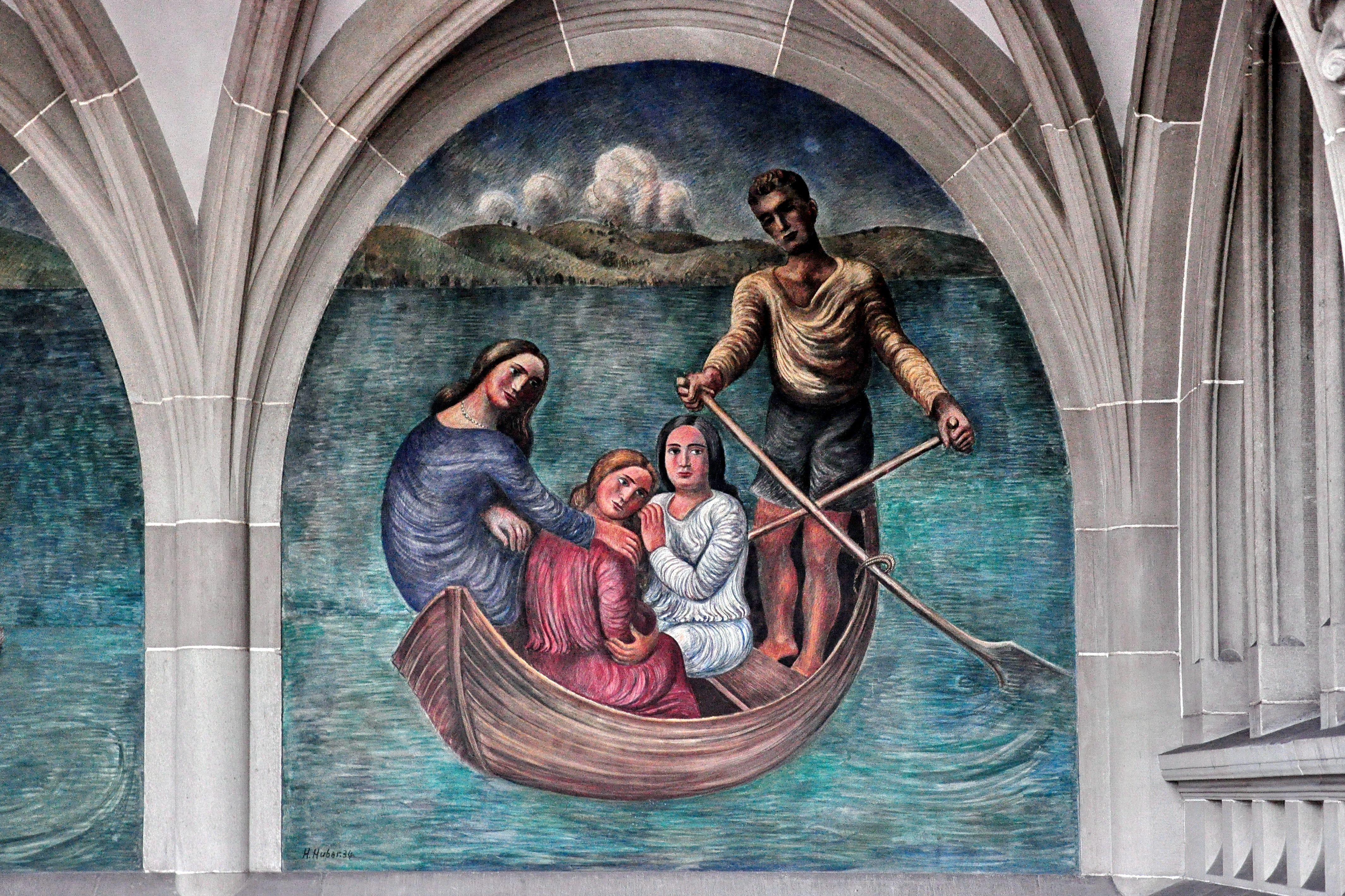 Amtshaus III in Zürich. Wandgemälde (1934) von Hermann Huber (1888–1967) Maler, Freskant, Zeichner, Radierer und Lithograf. Lindenhof